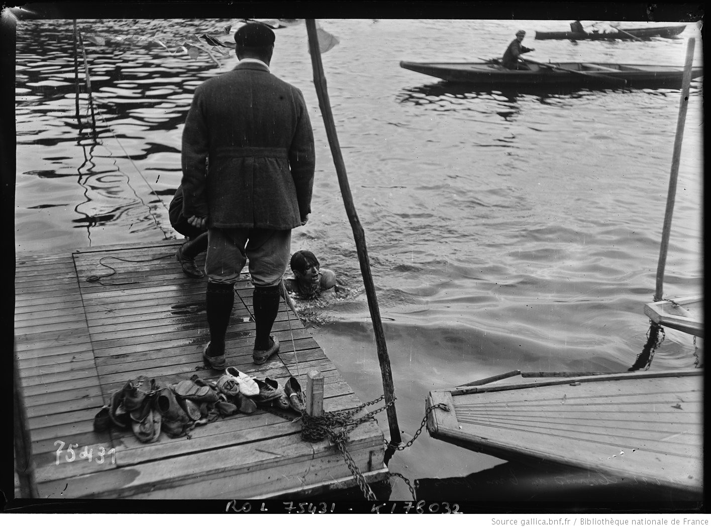 Latriche, 1er à Villennes-sur-Seine d'une course des 3 sports